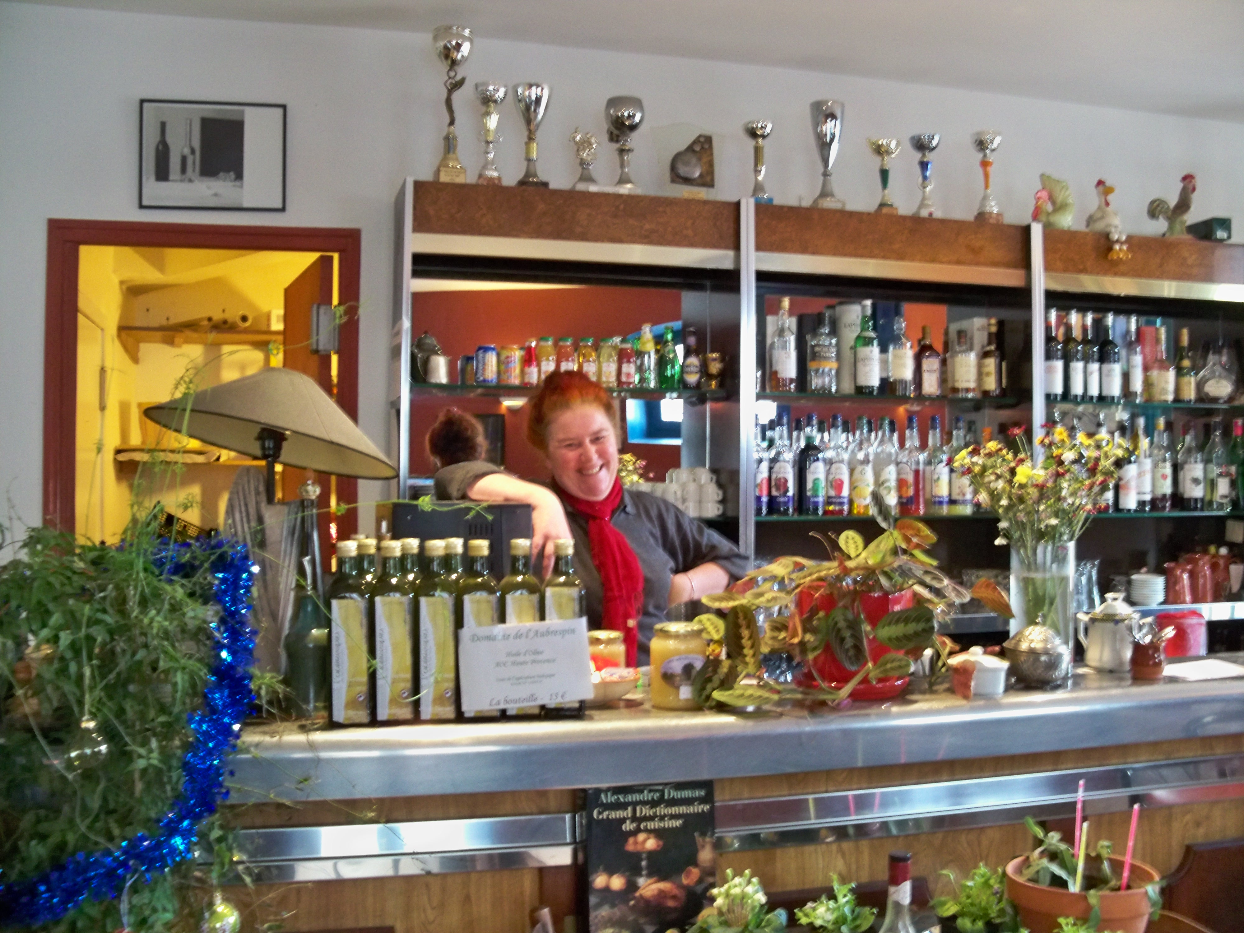 Emmanuelle Burollet, chef de cuisine et patronne du Bistrot de Pays de Lardiers (04)